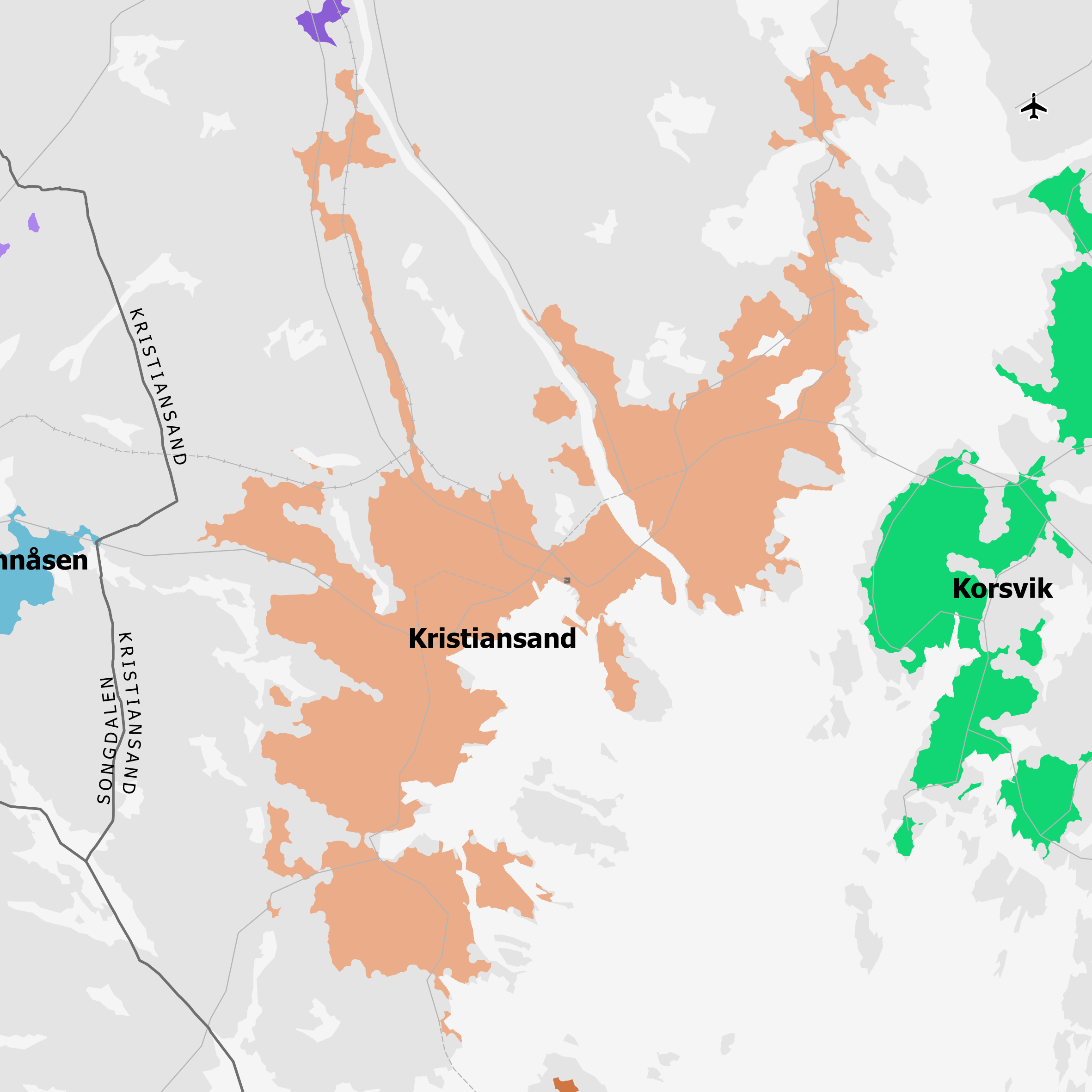 Tettsted 4002 Kristiansand pr. 1.1.2018